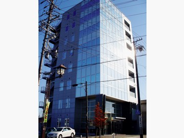 日本一ソフトウェア